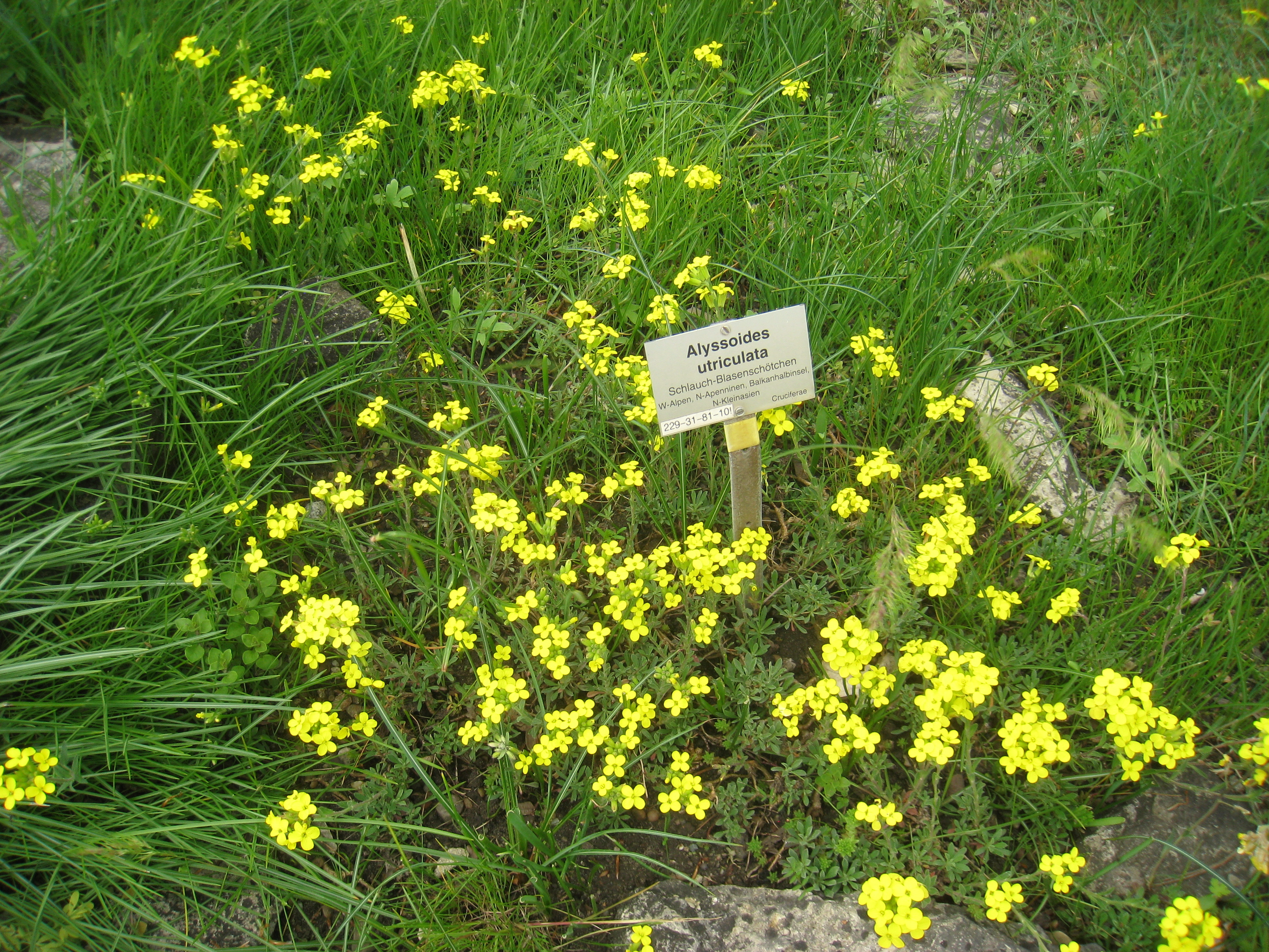 Alyssoides utriculata specimen, in the Botanischer Garten, Berlin-Dahlem (Berlin Botanical Garden), Berlin, Germany.